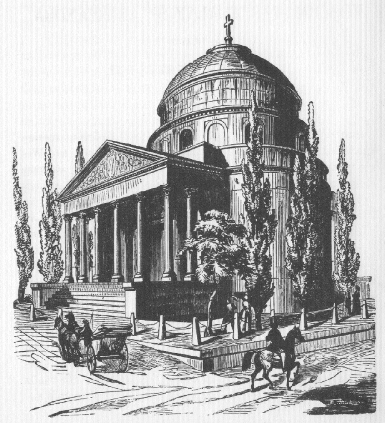 Kościół Św. Aleksandra w Warszawie (na pl. Trzech Krzyży)